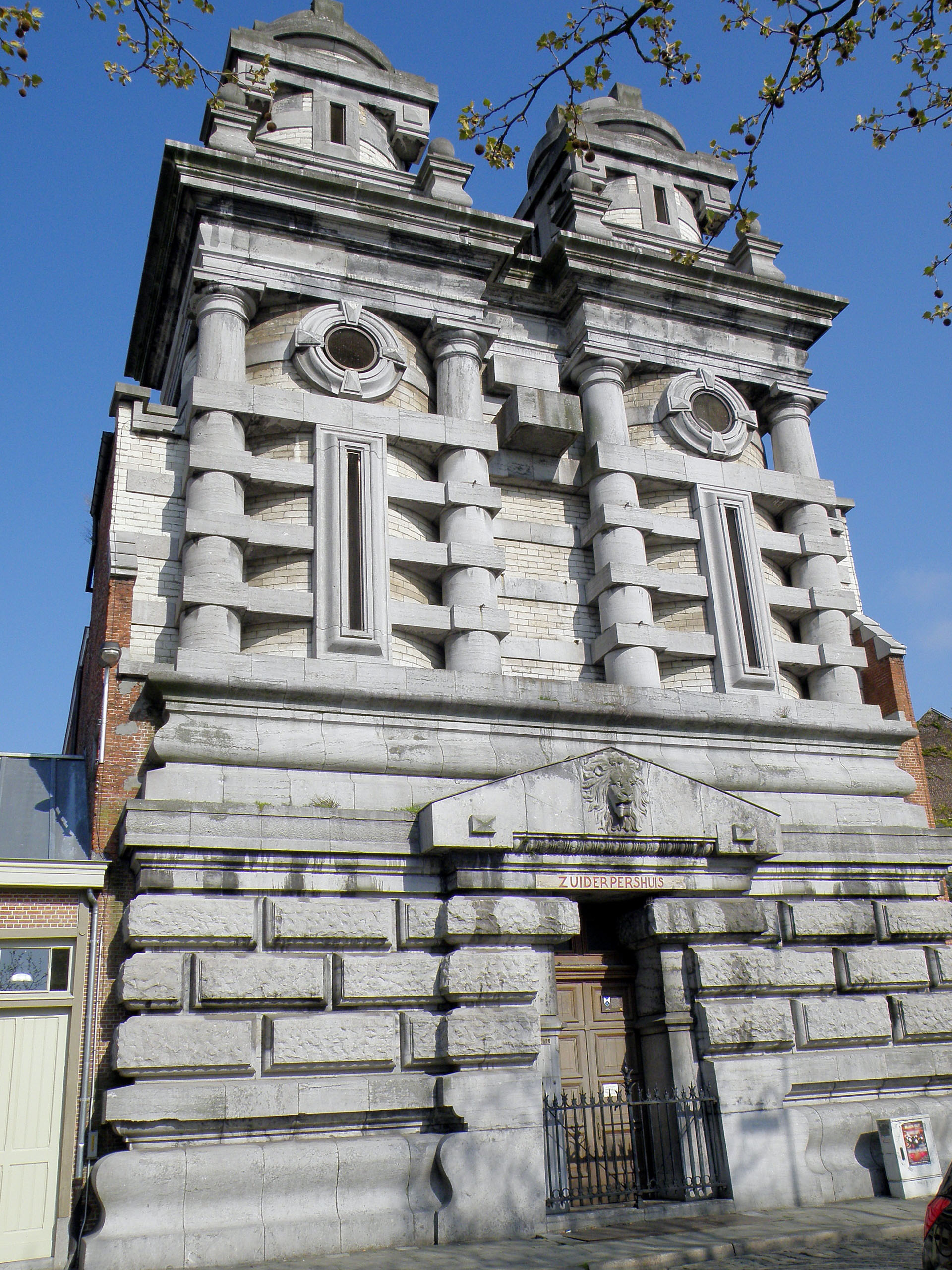 Antwerpen (België). Zuiderpershuis, gelegen Waalse Kaai nr. 14 (aan de zog. gedempte Zuiderdokken). Hydraulische krachtcentrale, gebouwd in 1882 in neobarokke stijl n.o.v. Ernest Dieltiens.